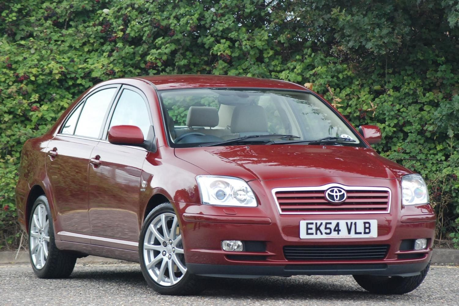 Toyota Avensis 2.4i T-spirit (UK-spec)